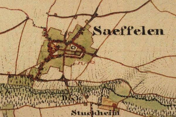 Preußische Kartenaufnahme 1846 - Uraufnahme